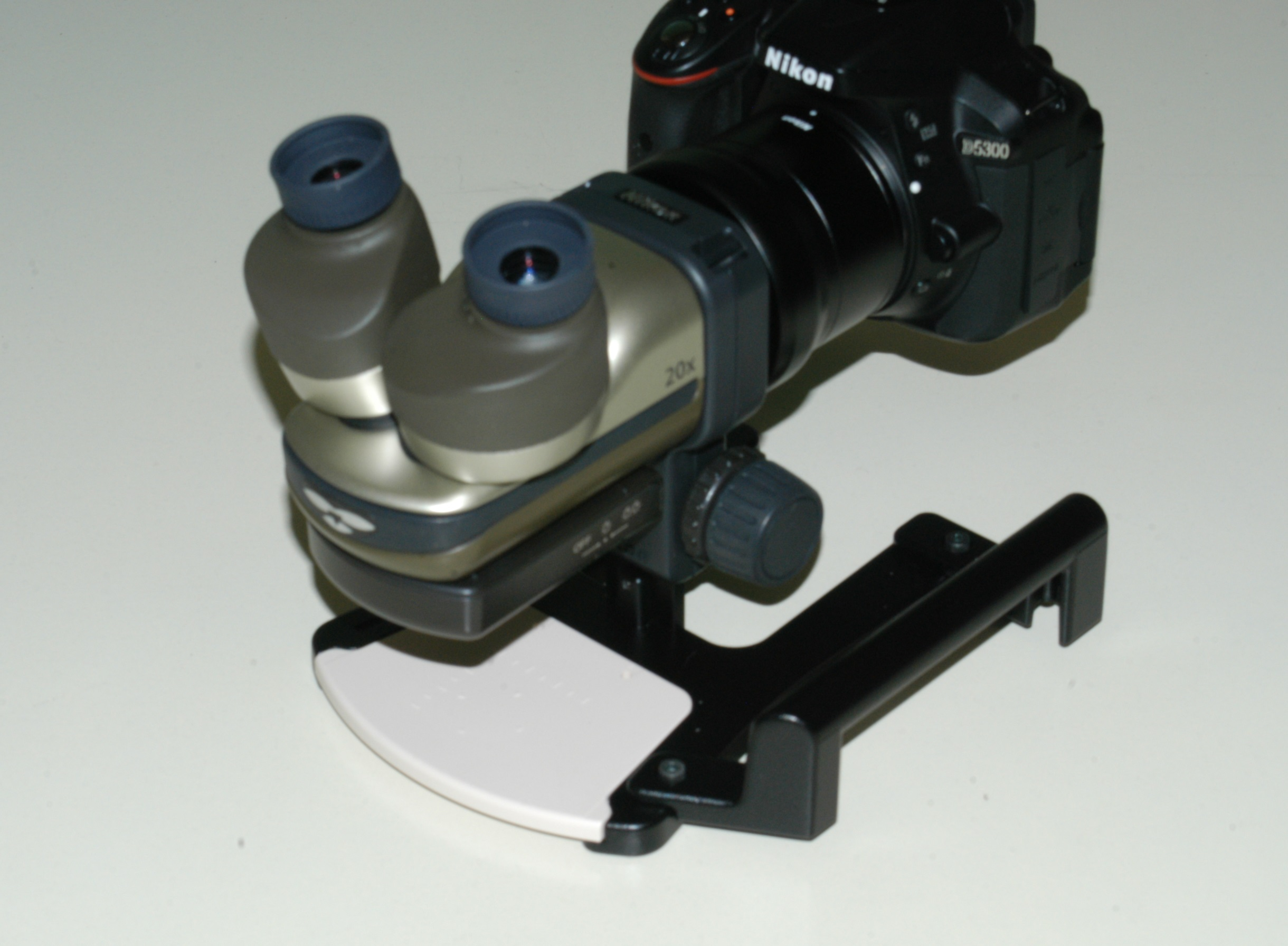 ニコンの顕微鏡・ネイチャースコープ「ファーブル」 Ｆマウント対応で、ニコンのデジ一眼装着状況